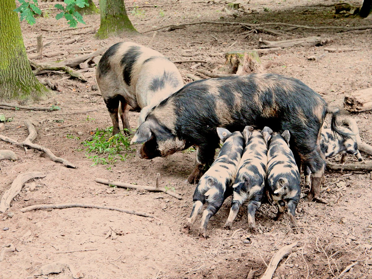 Turopolje-Schweine mit Frischlingen im Park von Ivenack